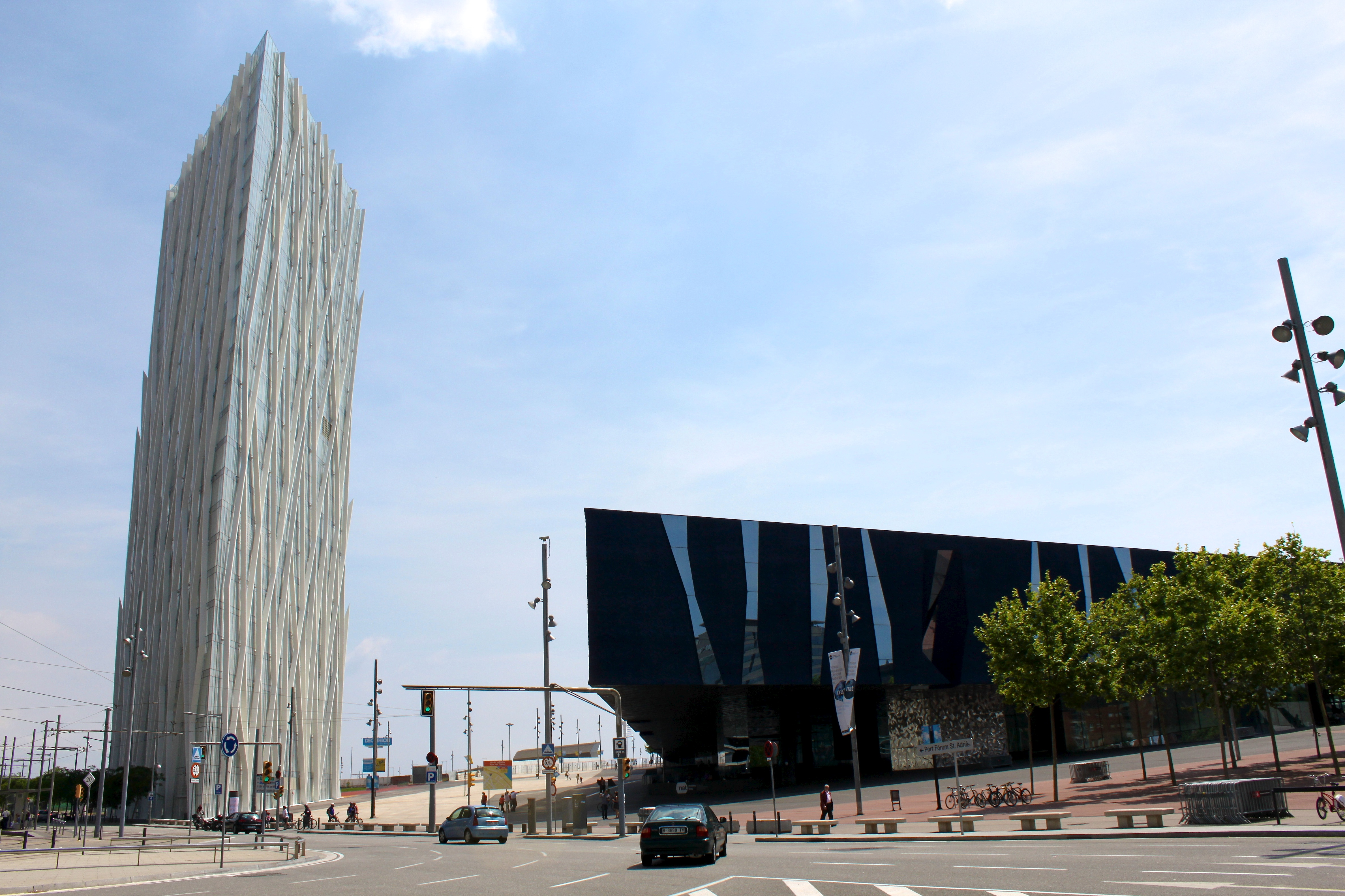 Barcelona